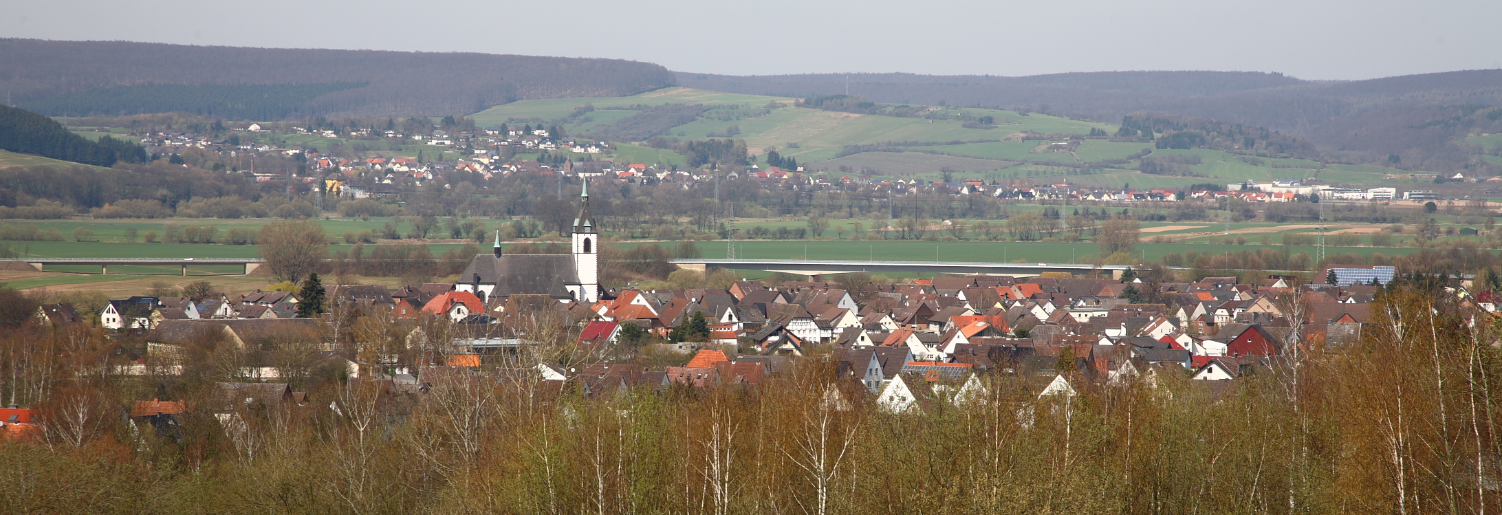 Lüchtringen